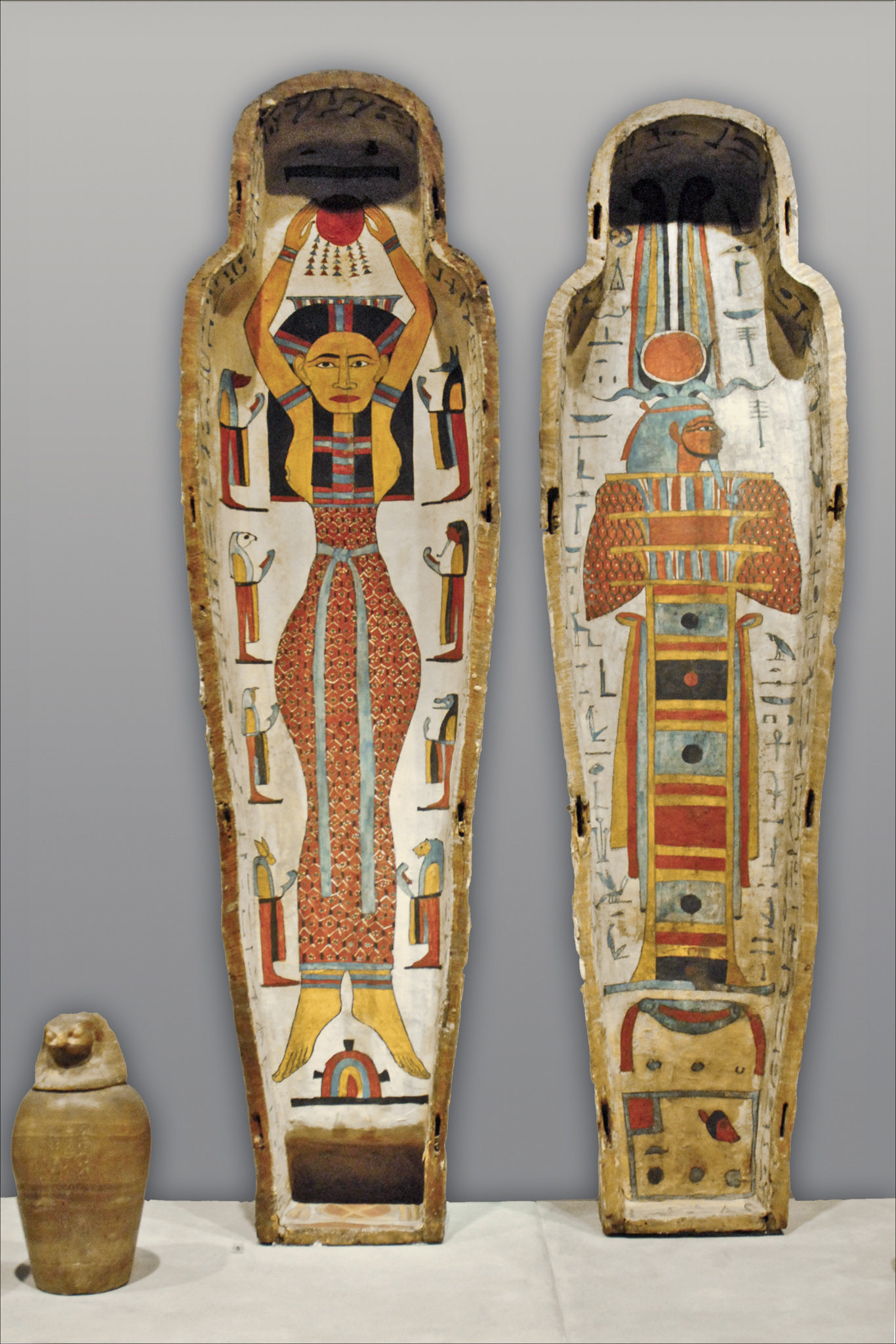 Cercueil de'Isetemkheb, fille d'Ankhsyeniset et de Roriou, sacrificateur du domaine d'Amon Thèbes-Ouest (?) Début de l'époque saïte, XXVIe dynastie, vers 664-500 avant J.-C. Bois entoilé, stuqué et peint L. 176 ; l. 48 ; P. 43 cm Dépôt de l'Etat Inv. 1969-197 dépôt du musée du Louvre Présentation officielle sur le site du musée avec description des figures mais une très mauvaise photographie.